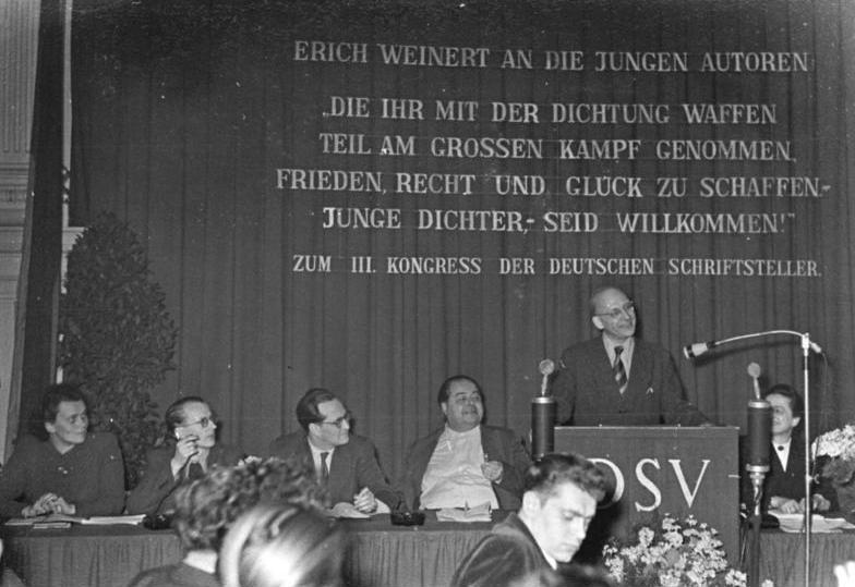 Zentralbild Illner 9 Mot. 8.3.1954 Konferenz junger Autoren in Leipzig Im Beisien von 400 Nachwuchsschriftstellern wurde am 6. und 7. März 1954 in Leipzig die erste Konferenz junger Autoren unserer Republik durchgeführt. Die Konferenz erarbeitete in den beiden Konferenztagen Vorschläge zur planmässigen wissenschaftlichen Förderung junger Autoren. Diese Vorschläge werden dem IV. deutschen Schriftstellerkongress zugeleitet werden. UBz: Blick auf das Präsidium der Konferenz. (V.l.n.r.) Irma Harder, Fritz Müller - Block, Wolf D. Brennecke - Köpenick, Walter Viktor, Am Rednerpult F.C.Weißkopf.